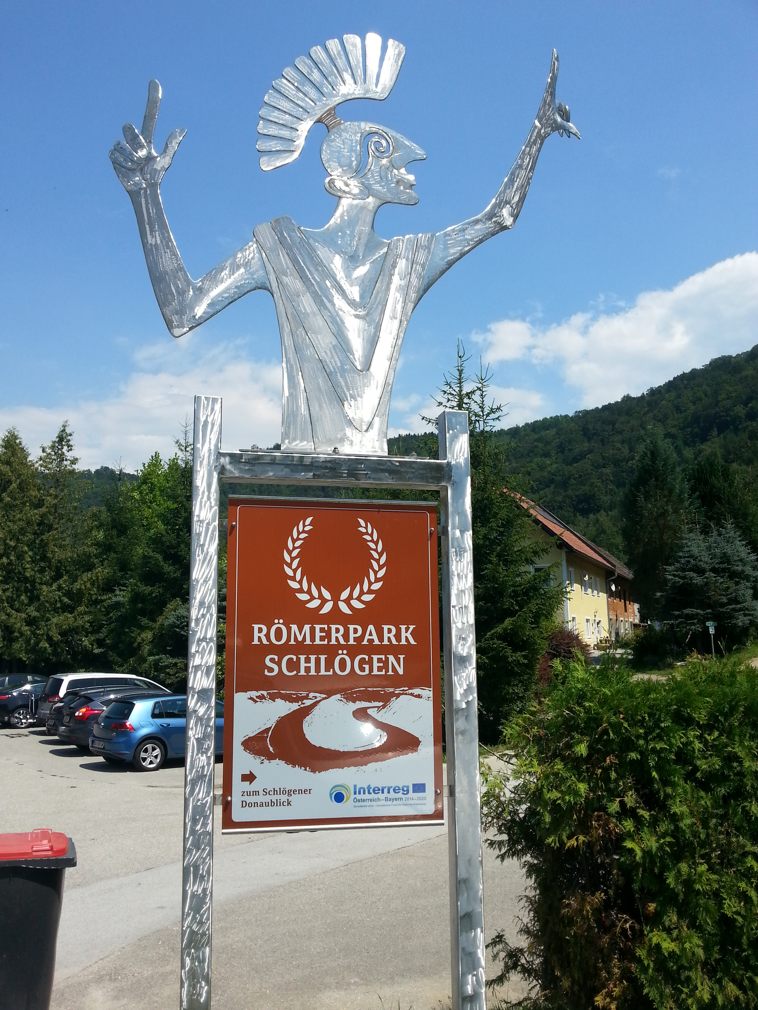 Eingang Römerpark Schlögen/Österreich.